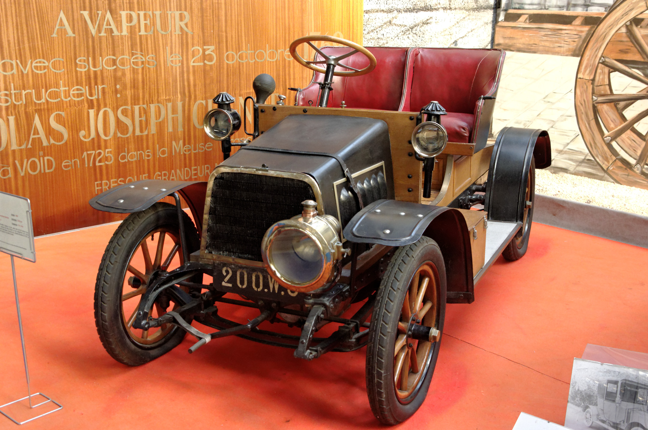 Doriot Flandrin et Cie (1908), Voiturette 2 places, 1 cyl., soupapes latérales, 1100 cm3, 8 ch., vitesse max. 45 km/h (Musée Automobile Reims Champagne, Reims, Marne, France)